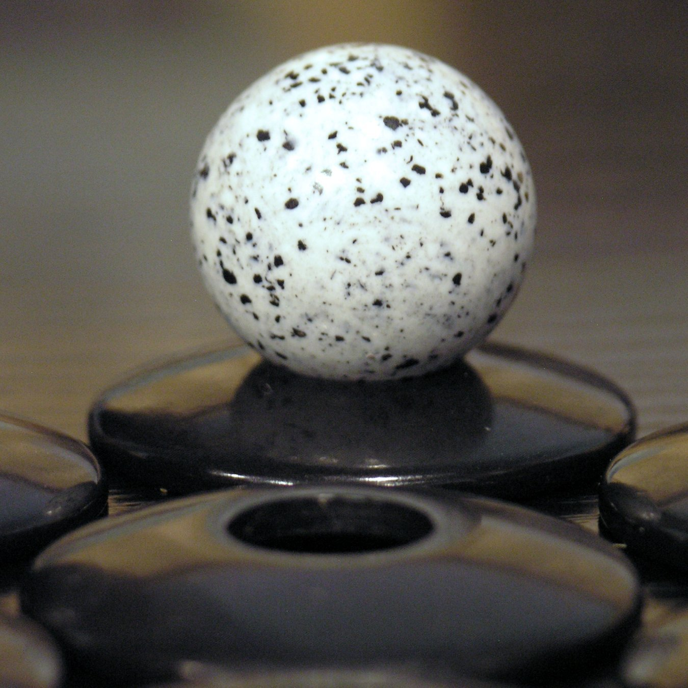 ZÈRTZ